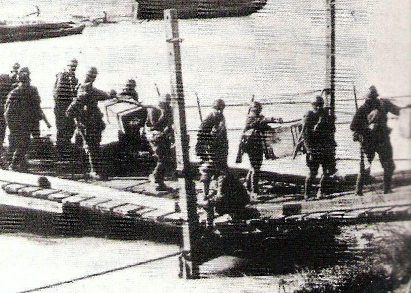 Soldati italiani attraversano il fiume Piave su una passerella